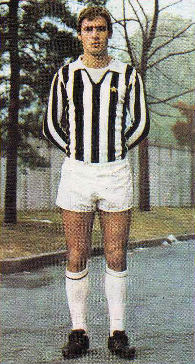 Il calciatore italiano Alberto Marchetti (n. 1954) alla Juventus all'inizio della stagione 1974-75.